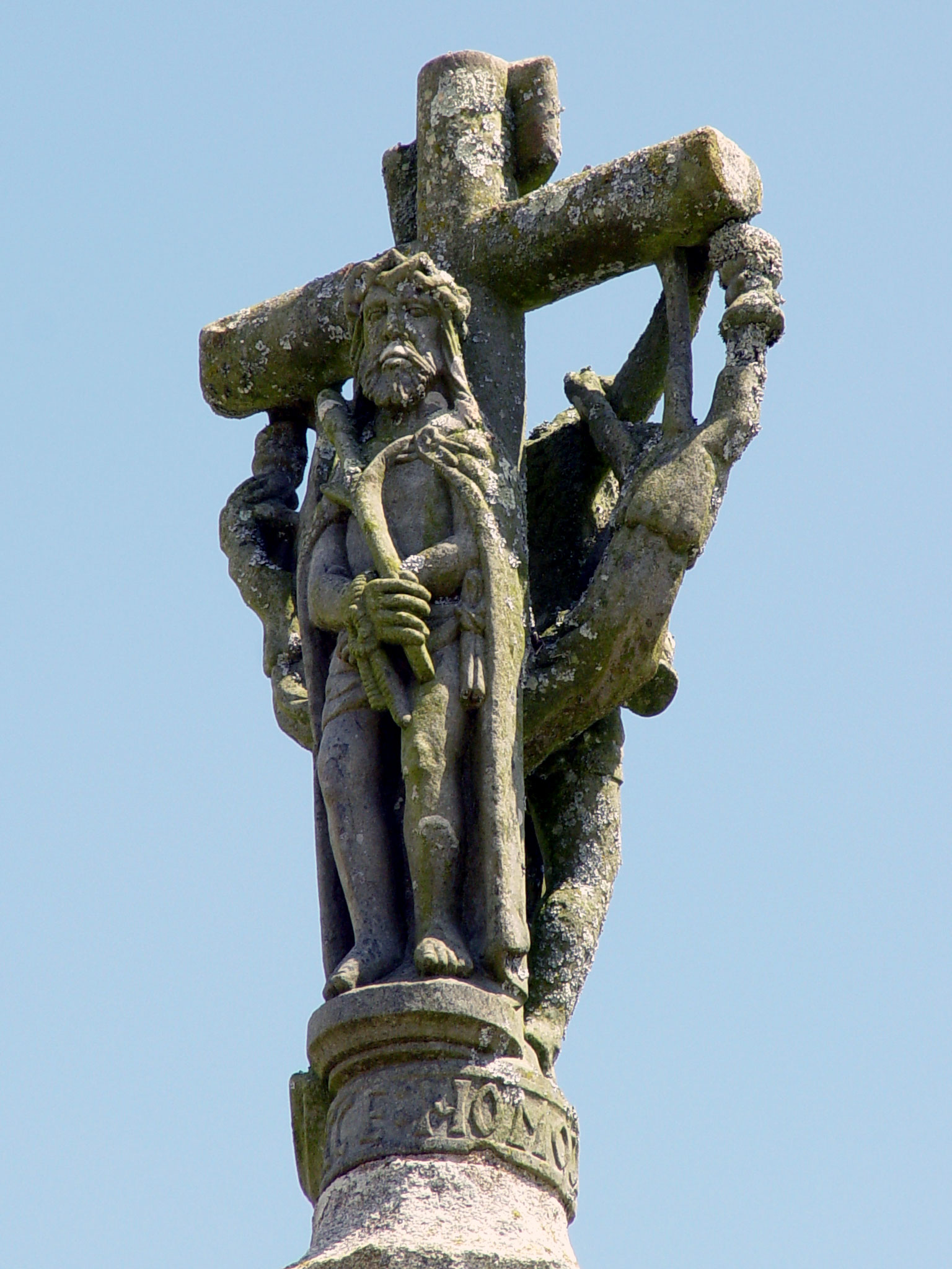 Laz (Bretagne, Finistère) Calvaire: An der Rückseite des Kruzifix: ECCE HOMO (1563)